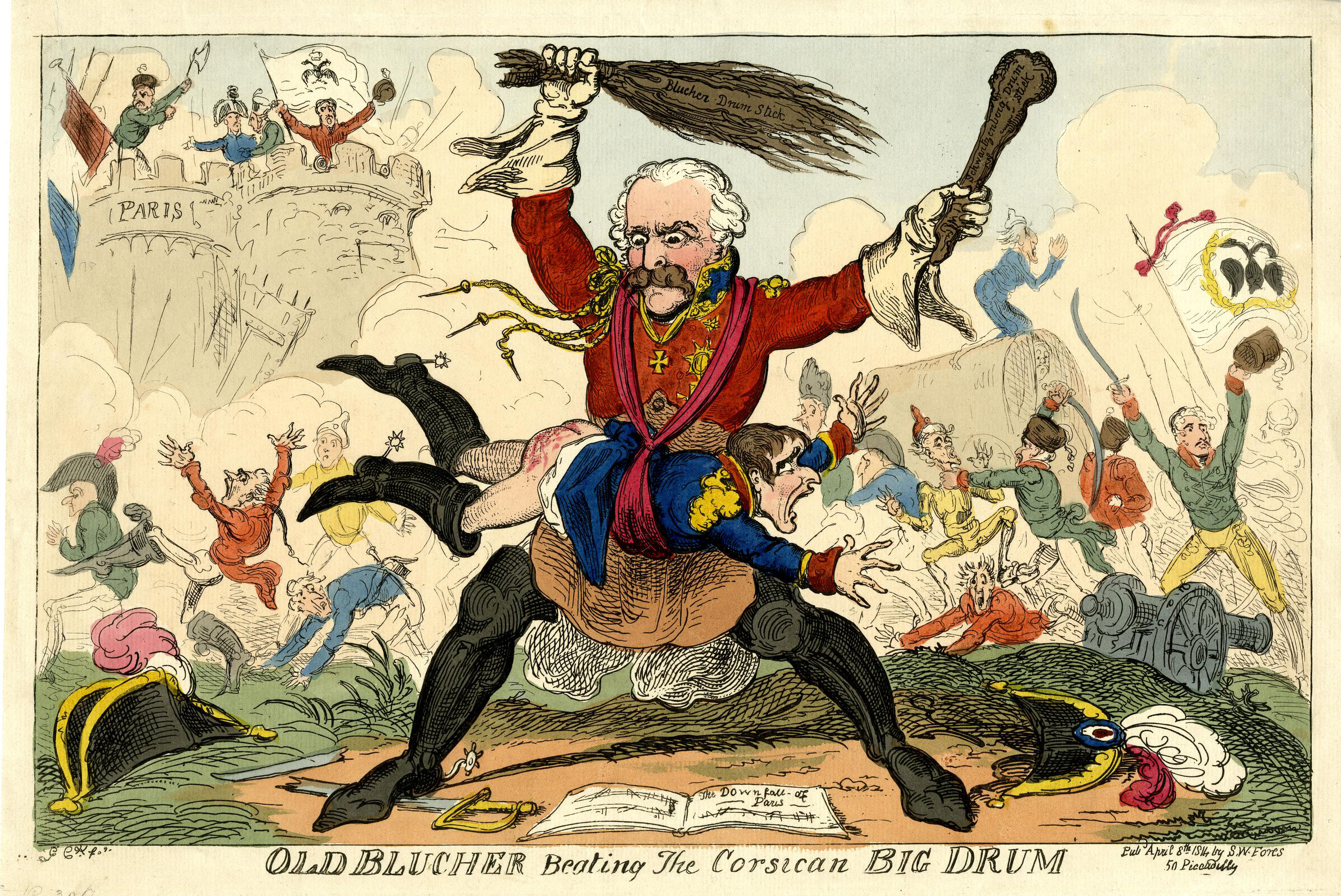 Kurz nach dem Einzug der Alliierten in Paris am 31. März 1814 feiert Cruikshank den preußischen Generalfeldmarschall Blücher als Sieger über Napoleon.